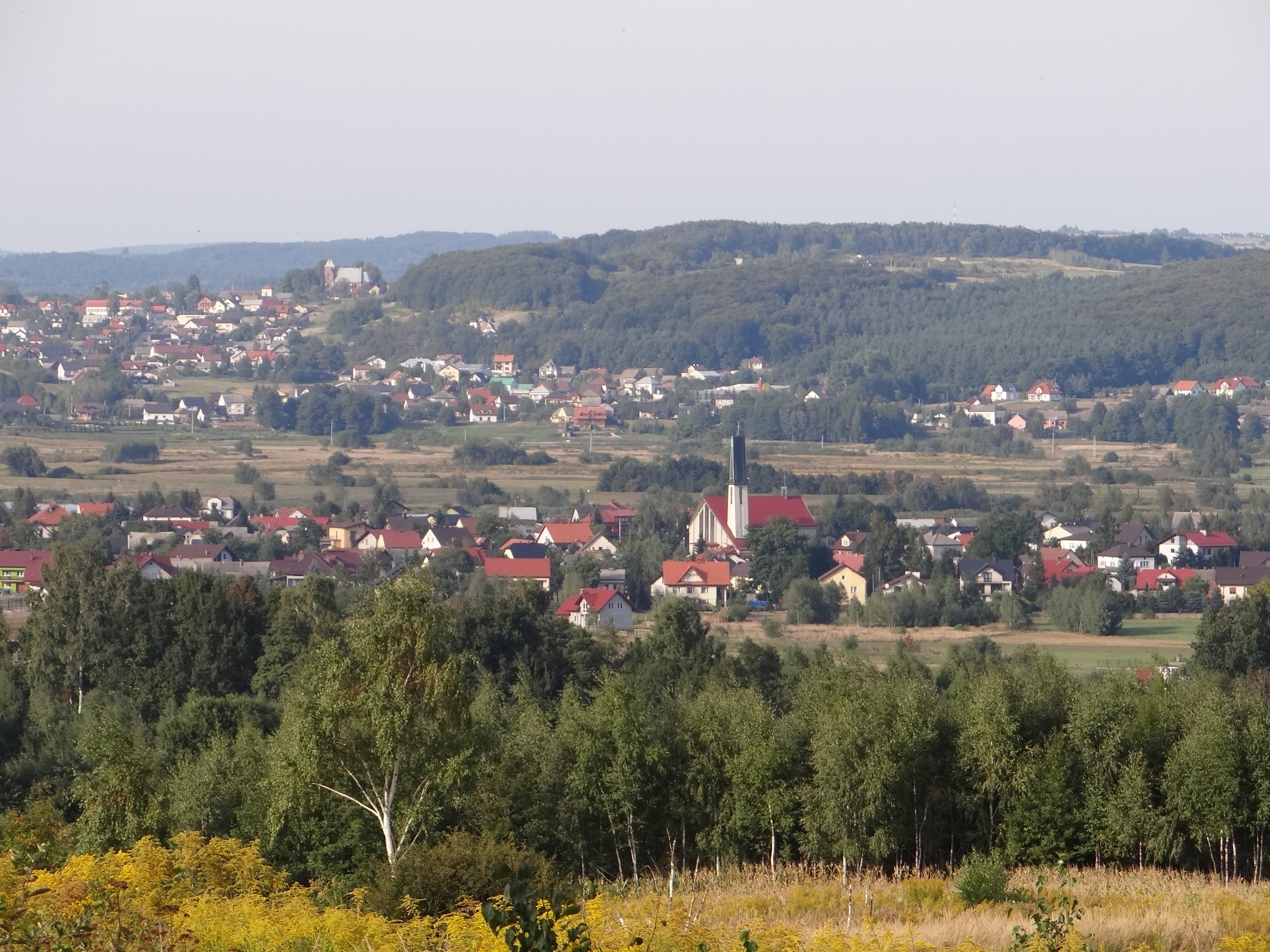 Kamień (u góry) i Łączany (na dole)